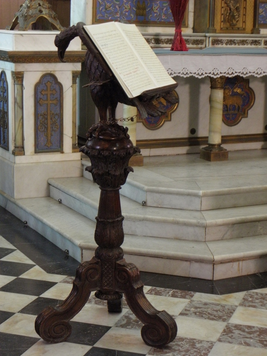 Aigle-lutrin de la cathédrale Saint-Samson de Dol-de-Bretagne (35).